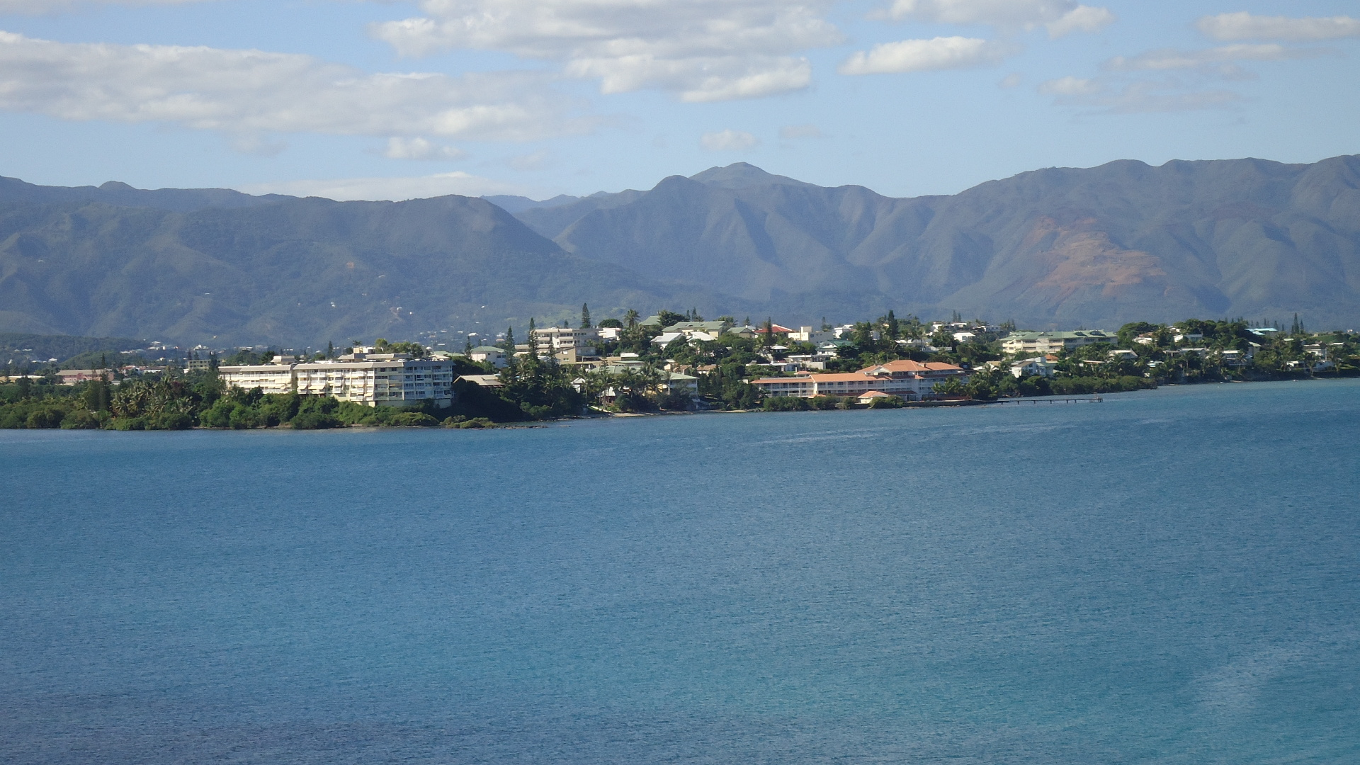 Habitations sur la presqu'île de Ouémo à Nouméa